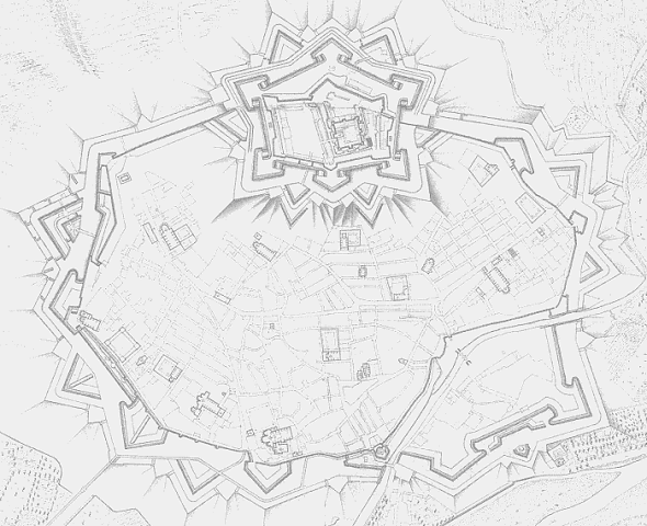 Plan de Perpignan en 1691